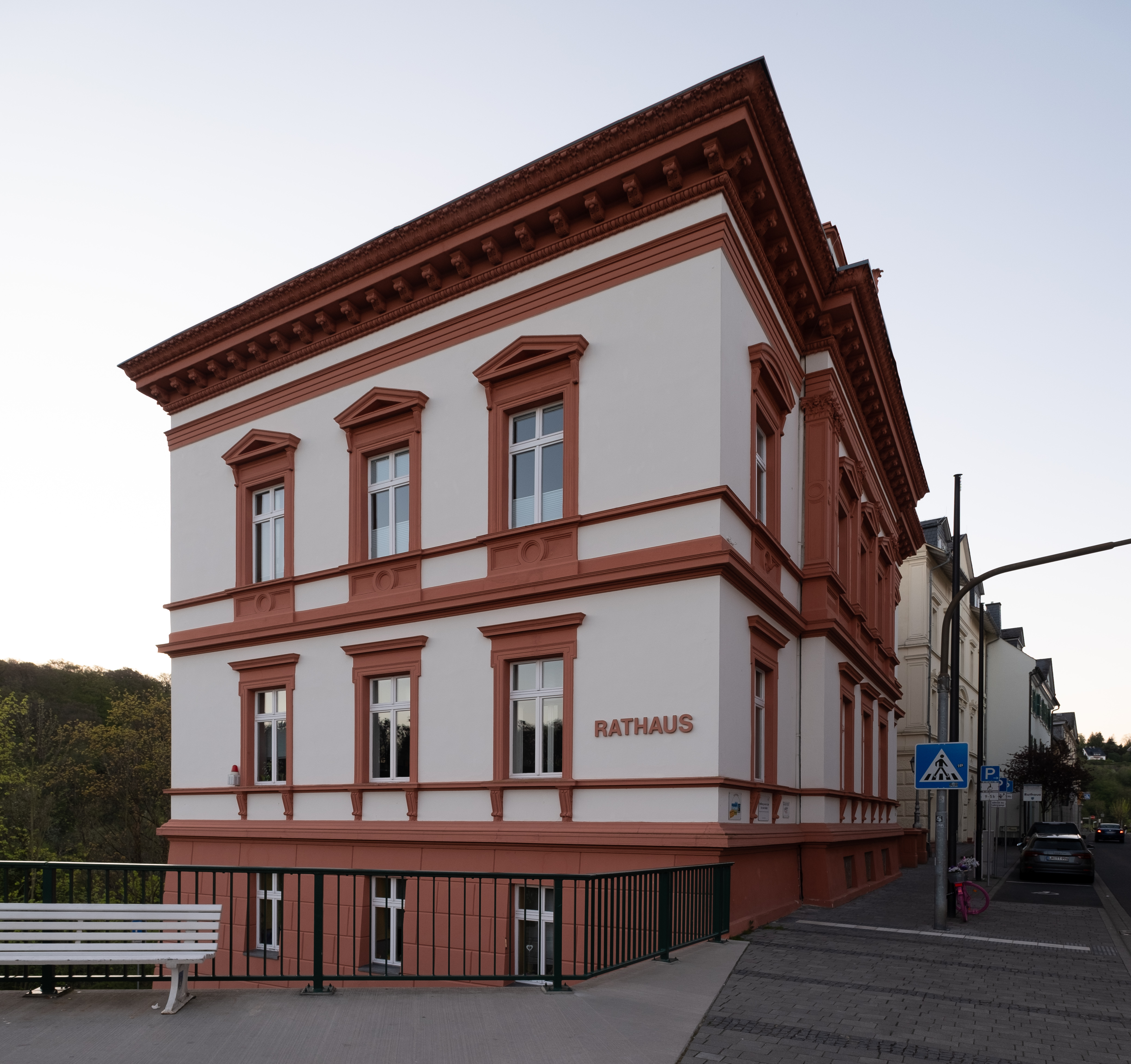 Rathaus Weilburg 2019